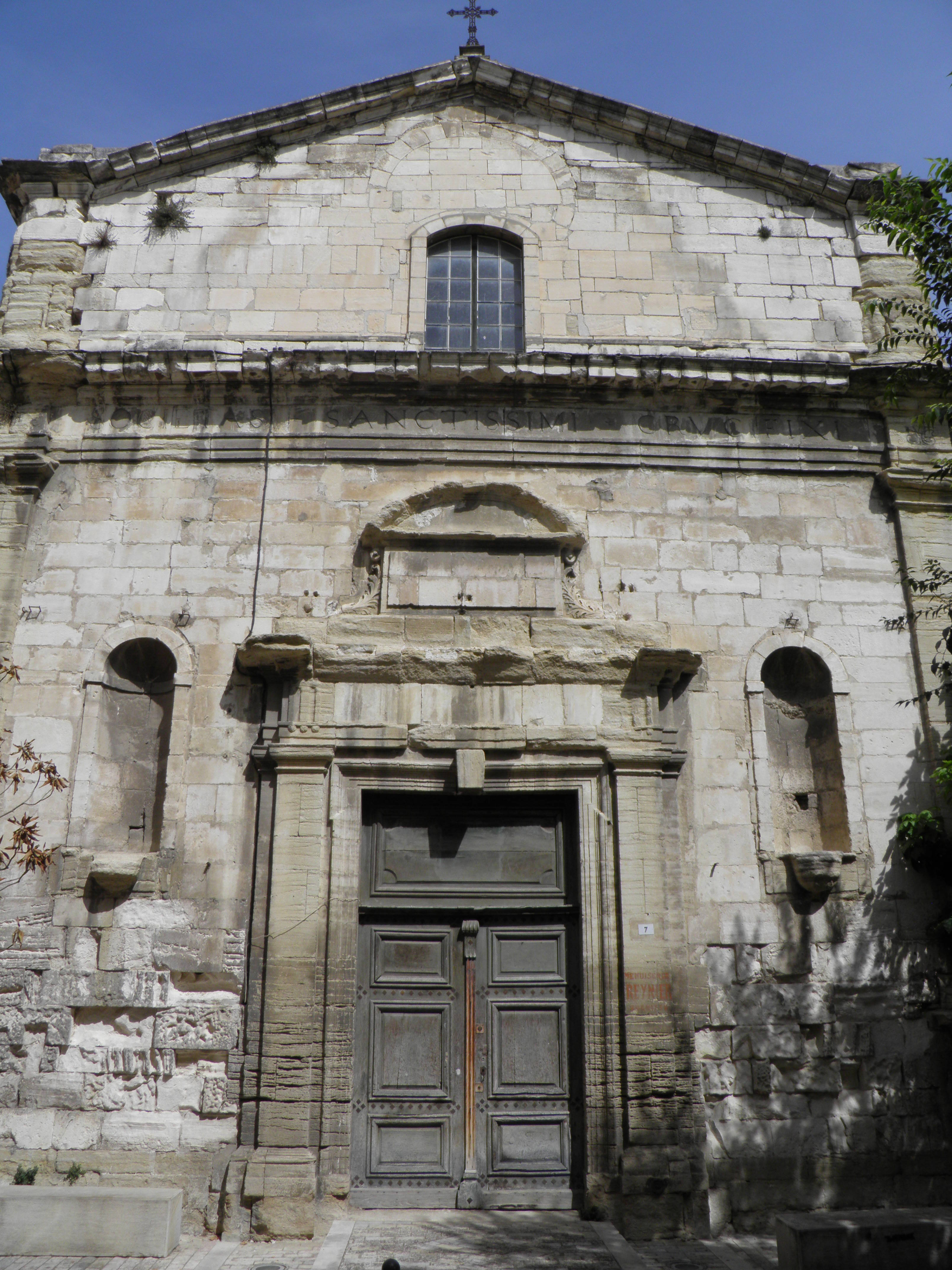 Chapelle du Très-Saint-Crucifix à Carpentras (Vaucluse, France).